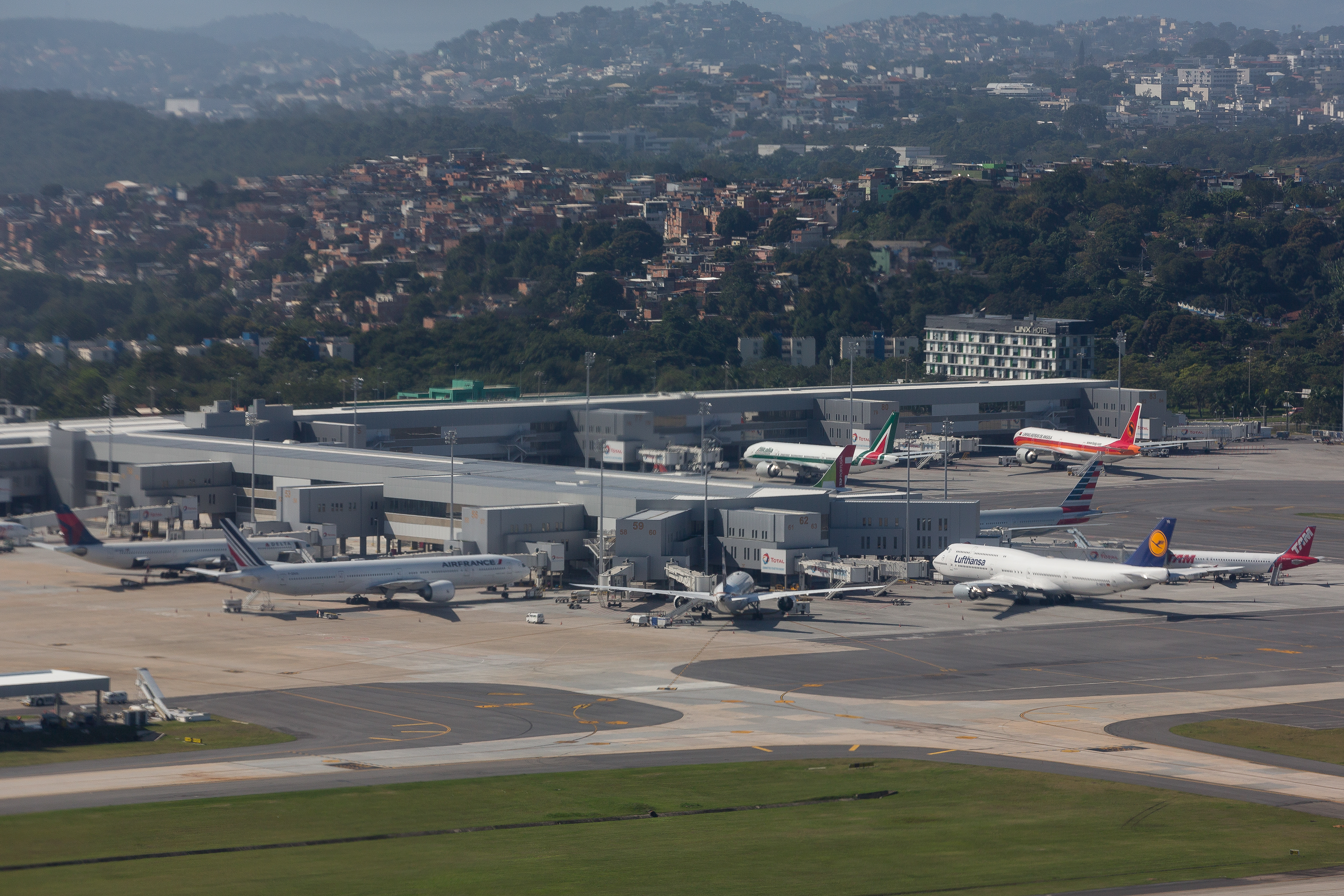 Imagem aérea do aeroporto Internacional do Rio de Janeiro - Galeão